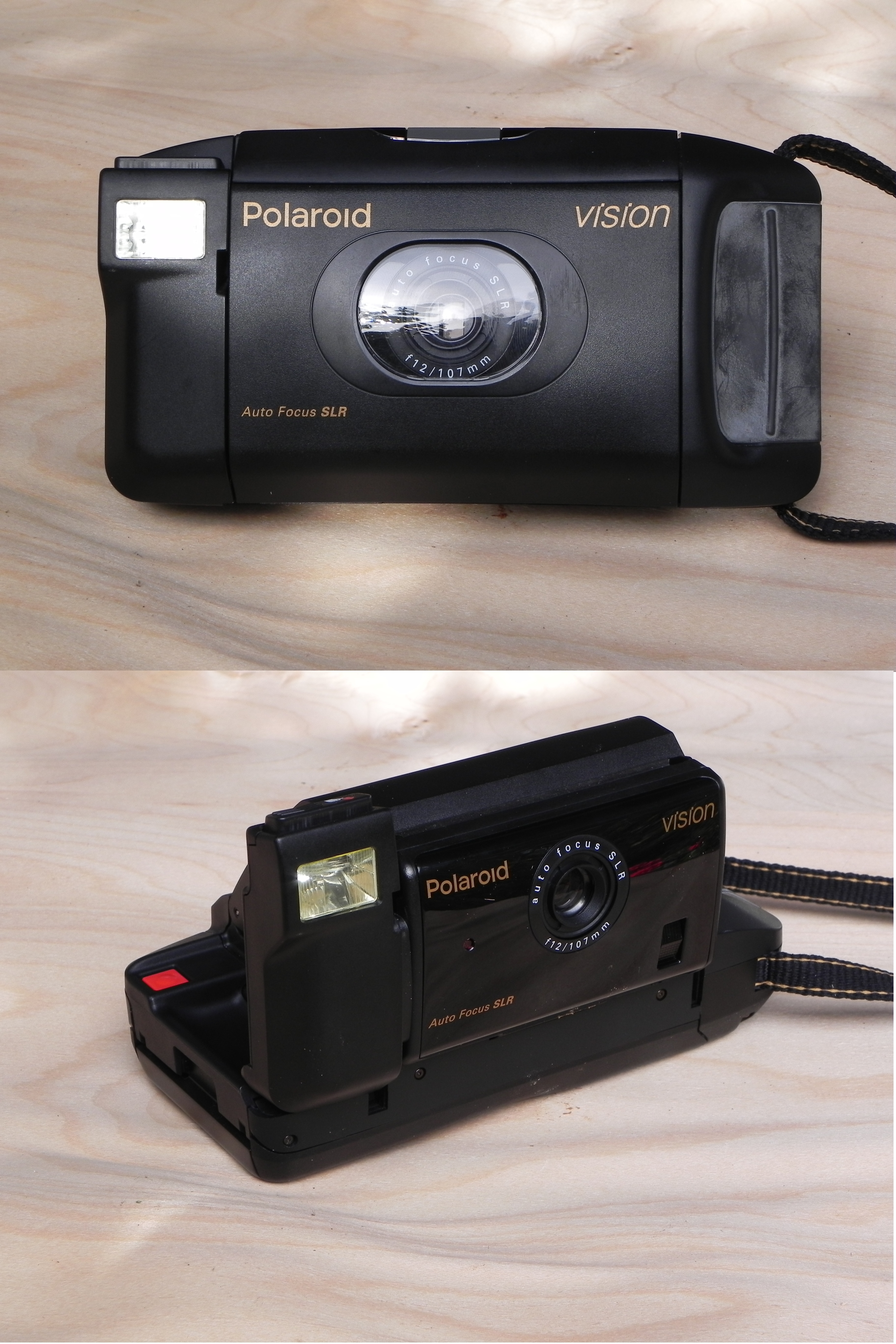 Polaroid Vision (auch Captiva), gebaut von 1993 bis 1997, Bildformat 73 x 55 mm, Objektiv 1:12,107 mm, Bild oben = geschlossen, Bild unten = aufgeklappt